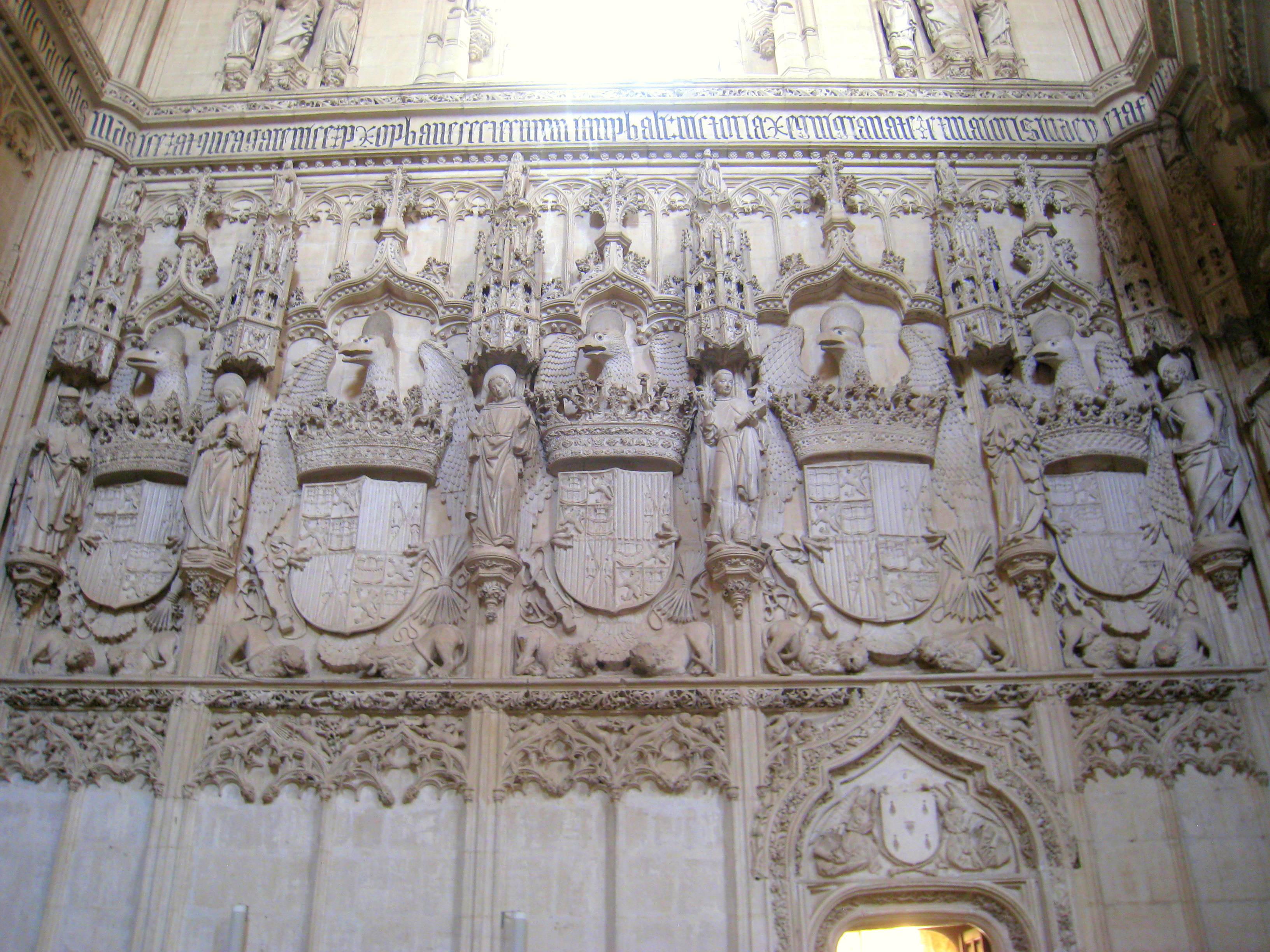 San Juan de los Reyes - Toledo, Spain.